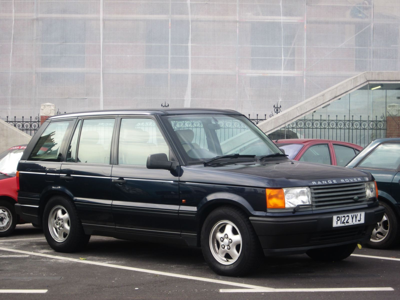 Land Rover Range Rover (2nd generation)